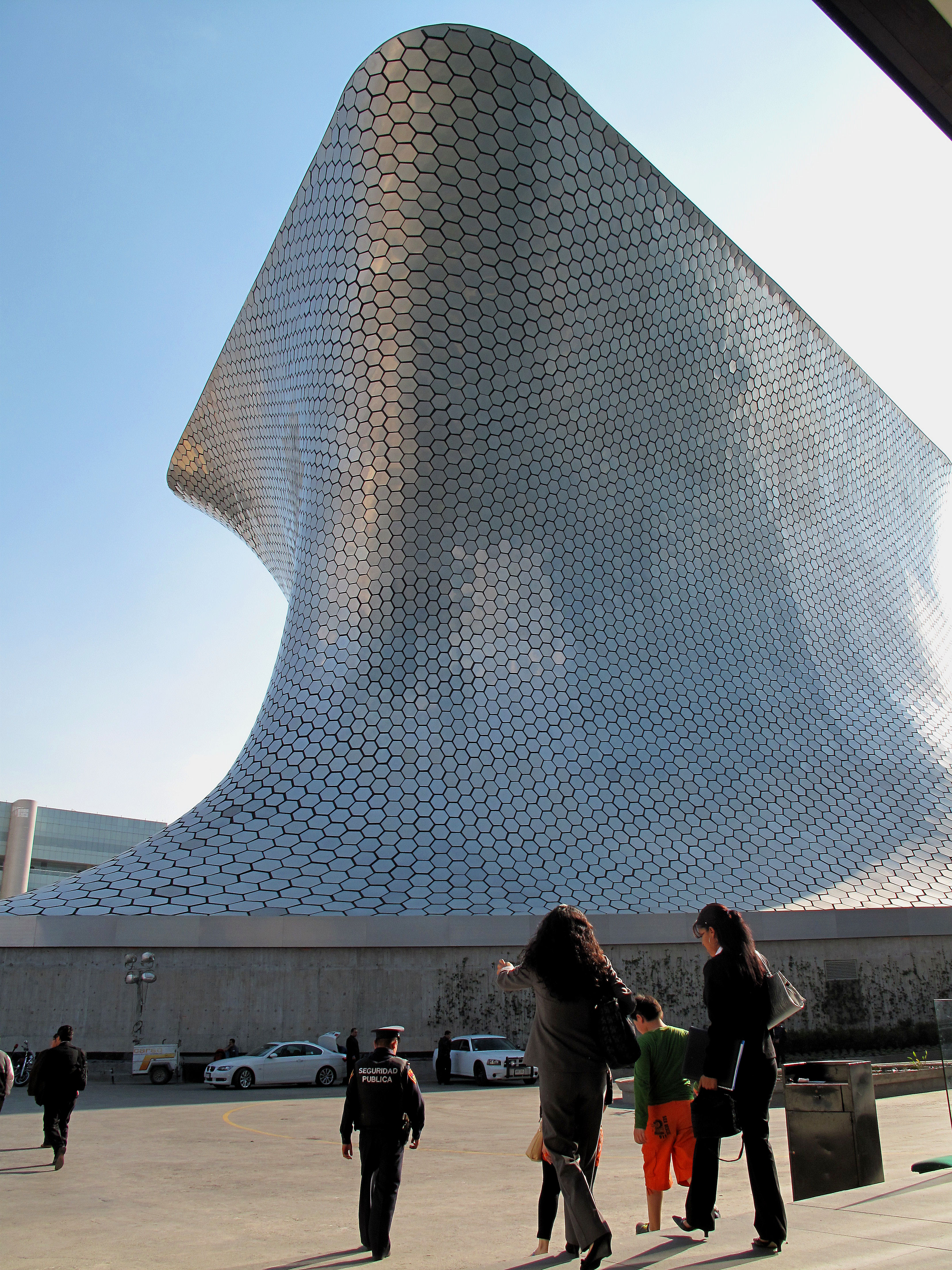 Museo Soumaya (Plaza Carso)